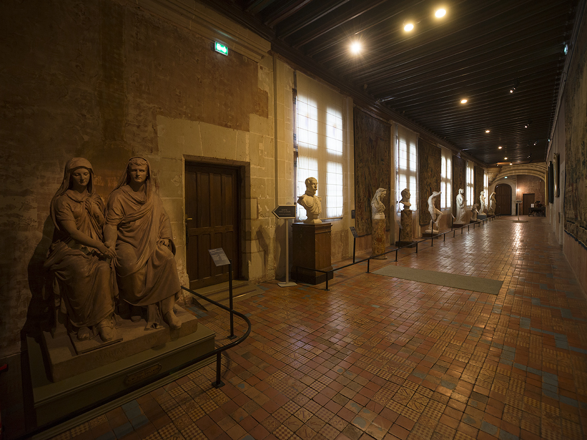 Couloir du musée des beaux-arts de Blois, novembre 2018.